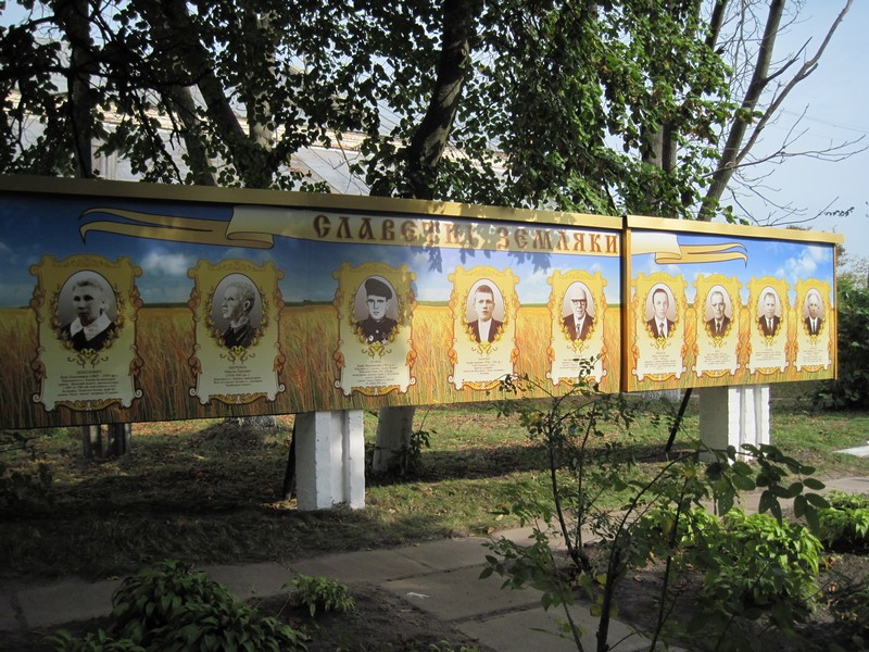 11891189.jpg: Меморіальна дошка в селі Іванівка,присвячена славетним українцям